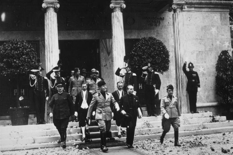 Benito Mussolini insieme al podestà di Milano Marcello Visconti di Modrone e altri funzionri inaugura il Planetario di Milano il 20 maggio 1930